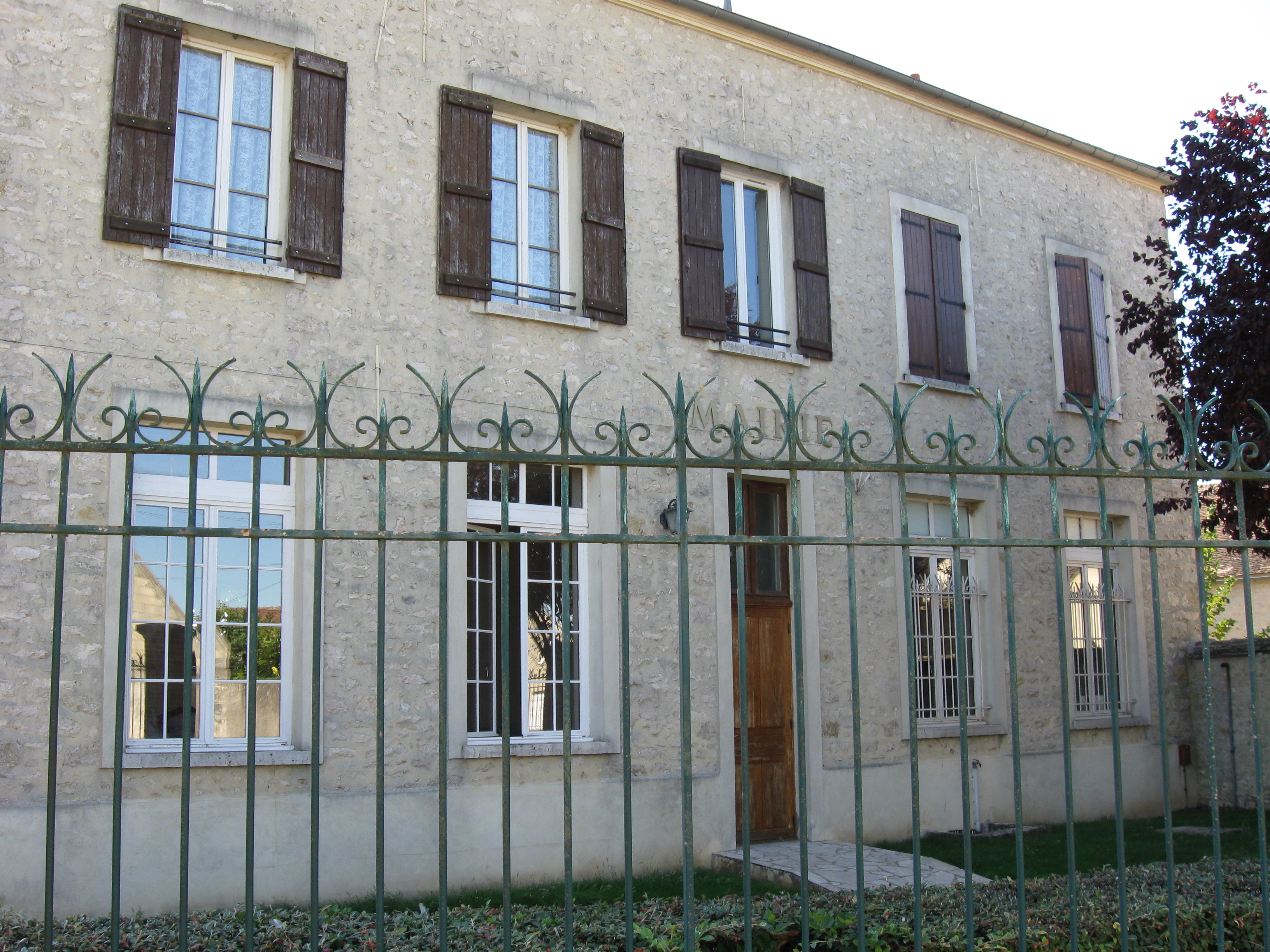 Mairie de Maisoncelles-en-Gâtinais. (Seine-et-Marne, région Île-de-France).